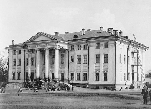 191. Хамовническiя казармы. Шефскiй домъ. (Москва)